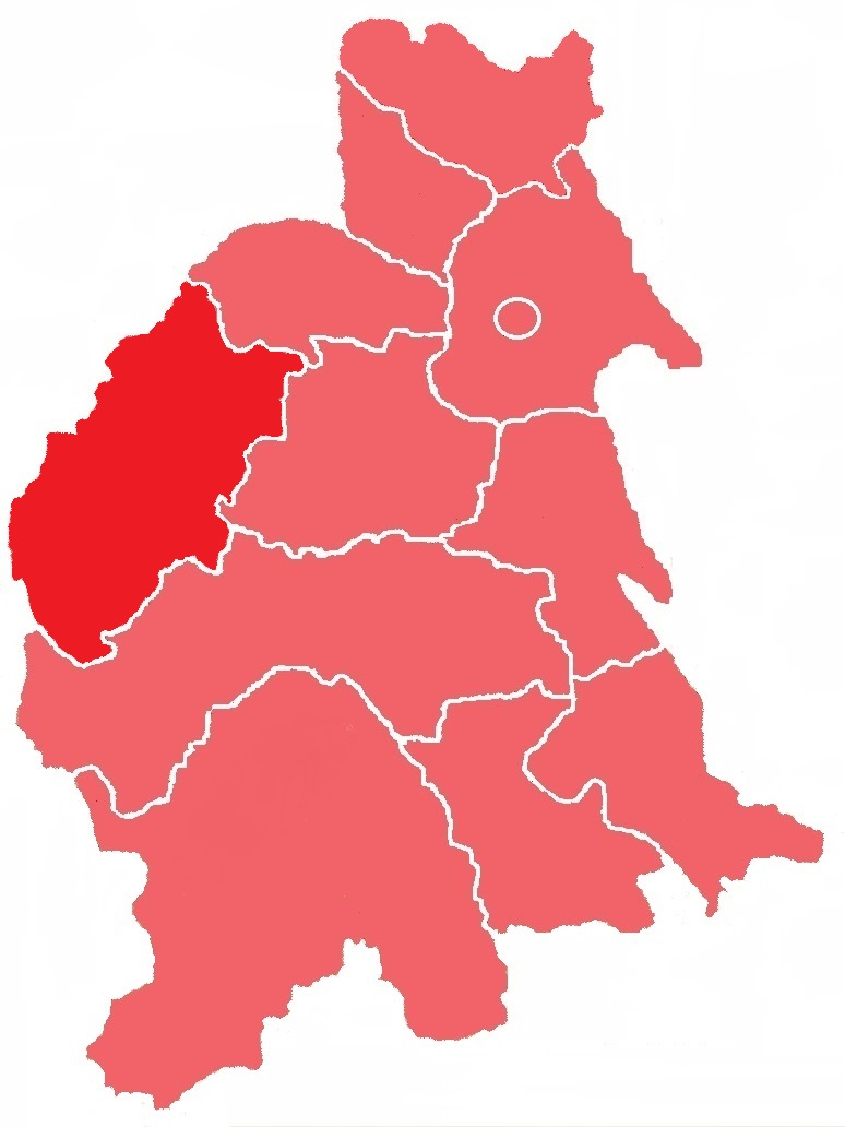 Вижницький повіт